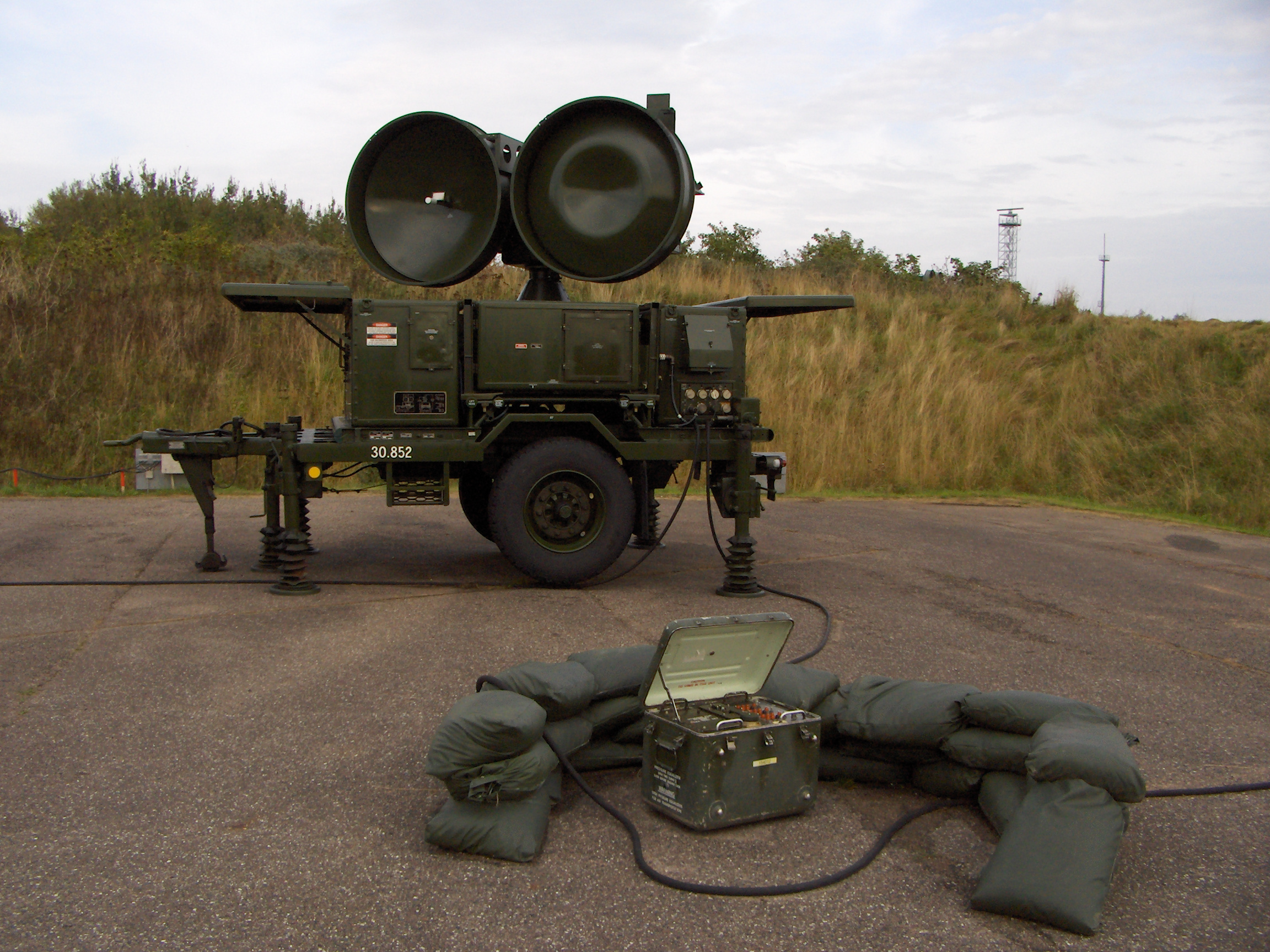 Hawk målfølgeradar